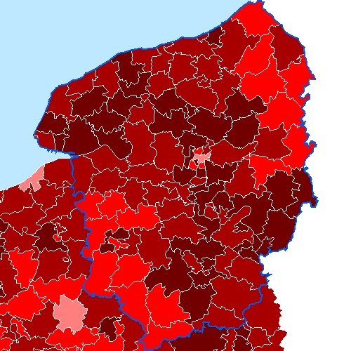 Carte de la proportion des moins de 20 ans dans la population de la région Haute-Normandie, par cantons, en 1999. Légende : Image:-20ans1999-canton legende.jpg Cette carte est généreusement fournie par l'IAAT (Institut atlantique d'aménagement du territoire) Je la place comme convenu avec eux sous licence GFDL Utilisateur:Archeos